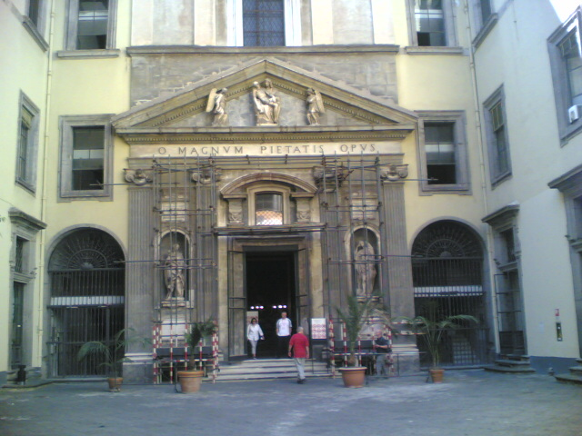 La facciata del Monte di Pietà (Napoli)